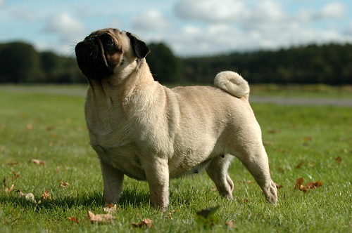 Categorie:Afbeelding hond (Original text: Mopshond teefje, beige.)